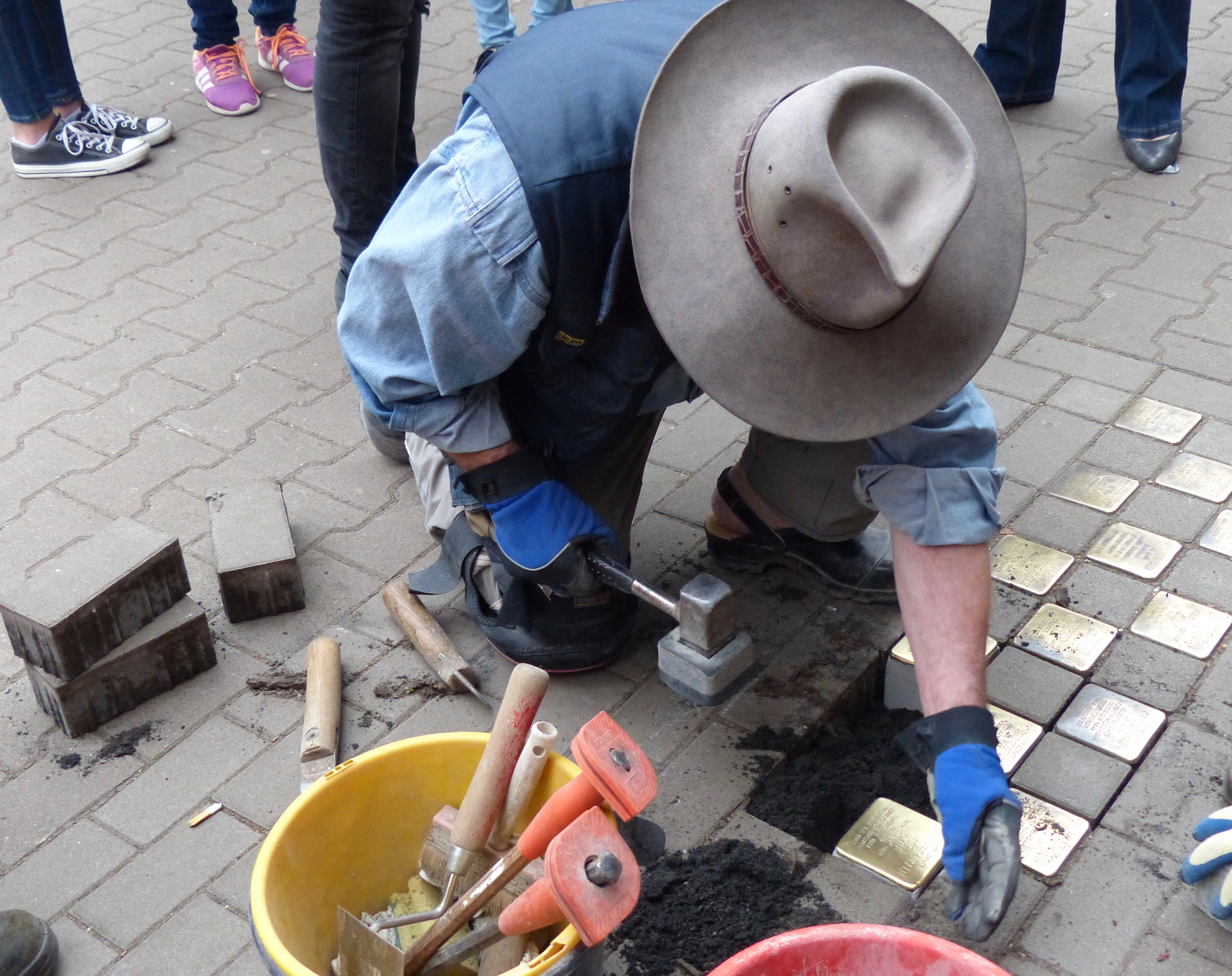 Stolpersteine Köln: Verlegung von drei Stolpersteinen vor dem Eingang des Gymnasiums Kreuzgasse (2017) durch Gunter Demnig